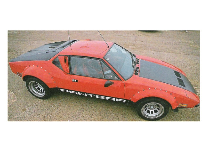 Beschreibung: De Tomaso Pantera GT4 in Tampa Quelle: A.Wart (Benutzer; Enthusiast, eigenes Foto) Datum: 23.02.1994 Sonstiges: JPEG-Bild, Abmessungen; 800 x 600, 86kb